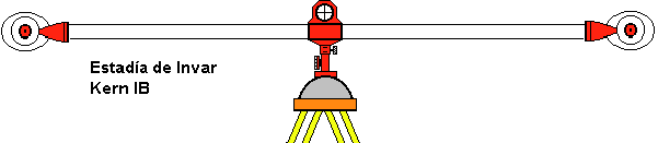 Mira horizontal, Paraláctica o Estadía de Invar